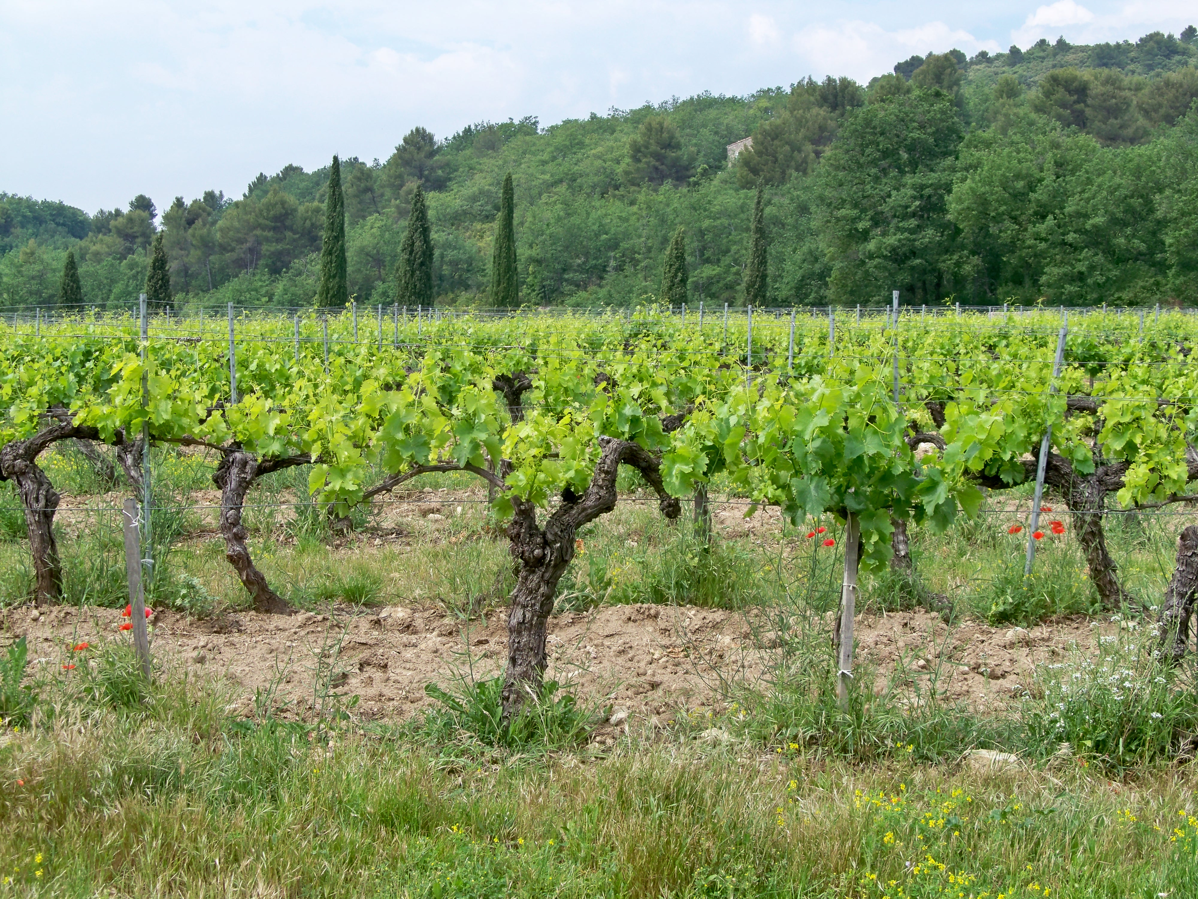 Chateau Unang, domaine viticole à Malemort du Comtat (84)